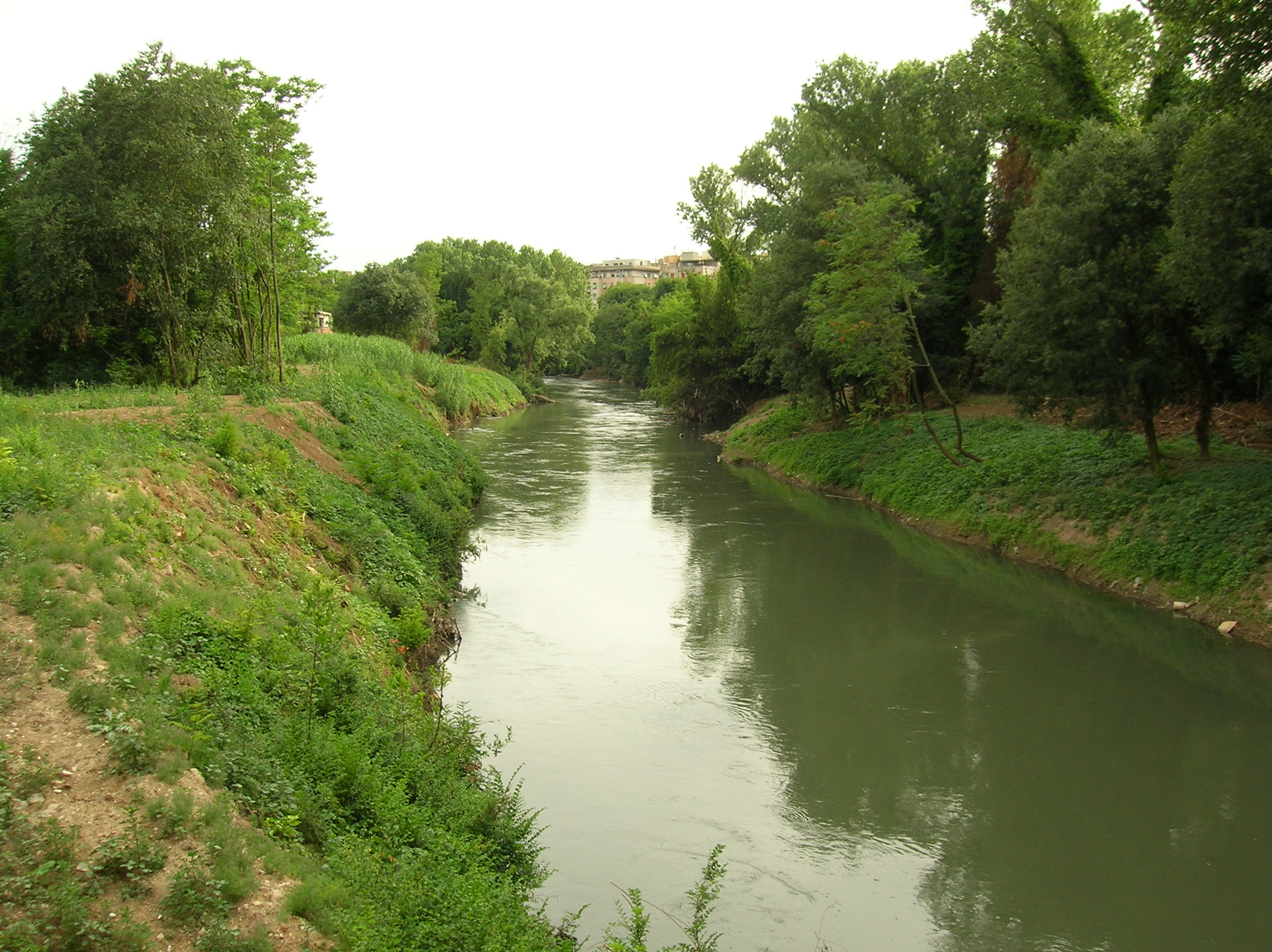 Aniene Ponte Nomentano nella Riserva Naturale Valle dell'Aniene Roma